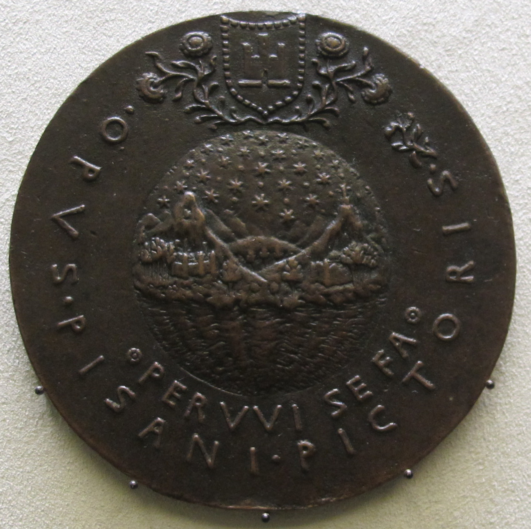 Pisanello, medaglia di don inigo d'avalos, recto con universo, 1448-49 ca.